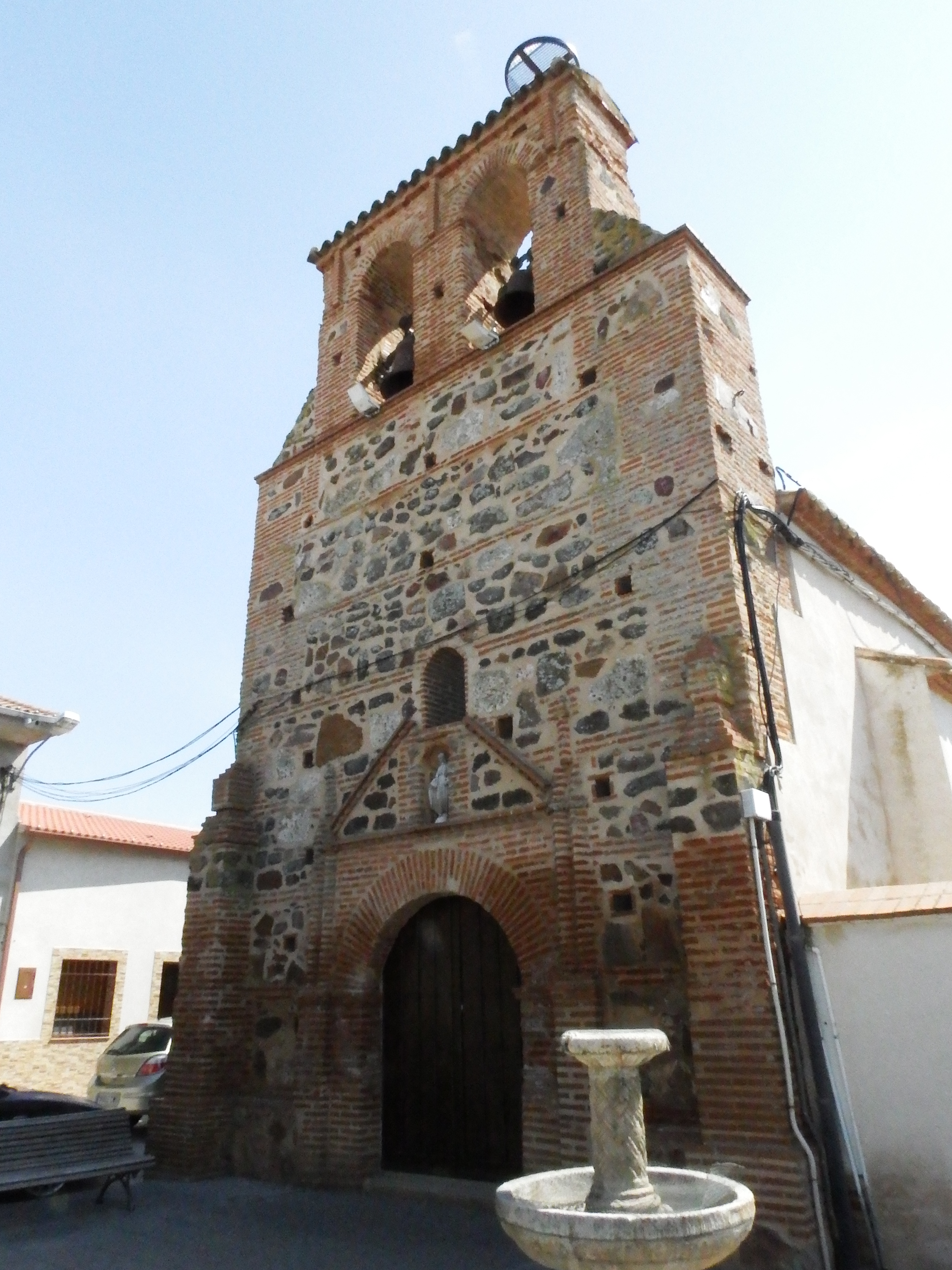 Cabezarados, detalle de fachada principal rematada en espadaña.